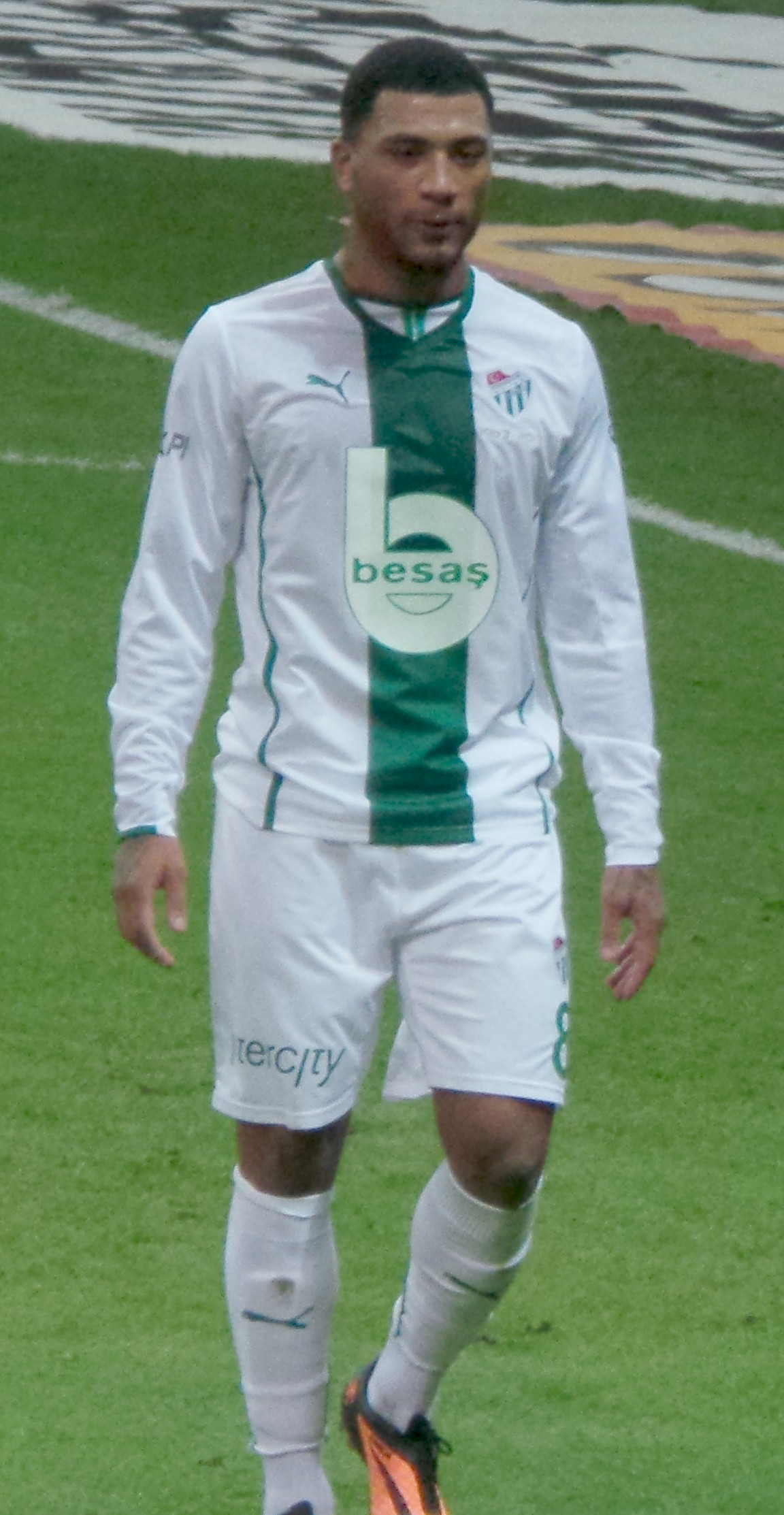 Kazım Kazım Bursaspor formasıyla Galatasaray maçında